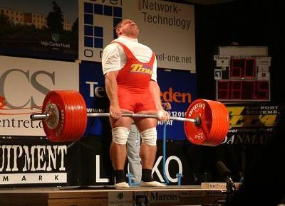 bfbdfb